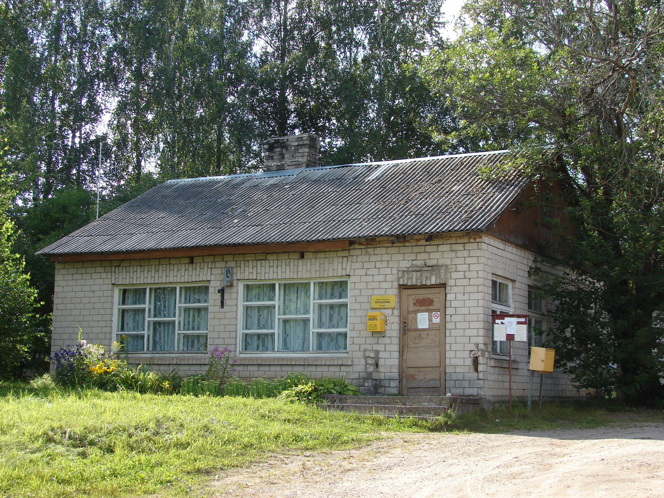 Pasta nodaļa Ozolaines pagasta Balbišos.